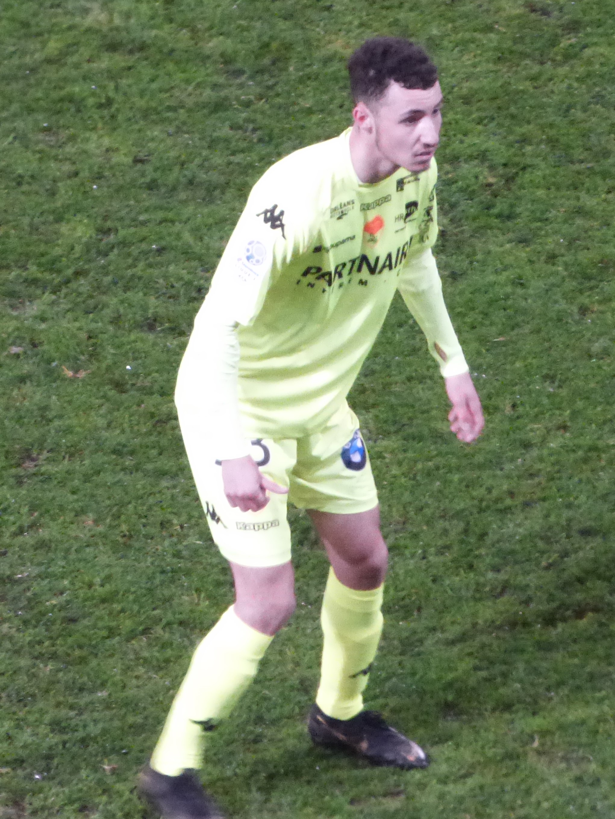 Liamine Mokdad lors du match RC Lens / US Orléans, comptant pour la vingt-huitième journée du championnat de France de football de Ligue 2 2019/2020, le 9 mars 2020.